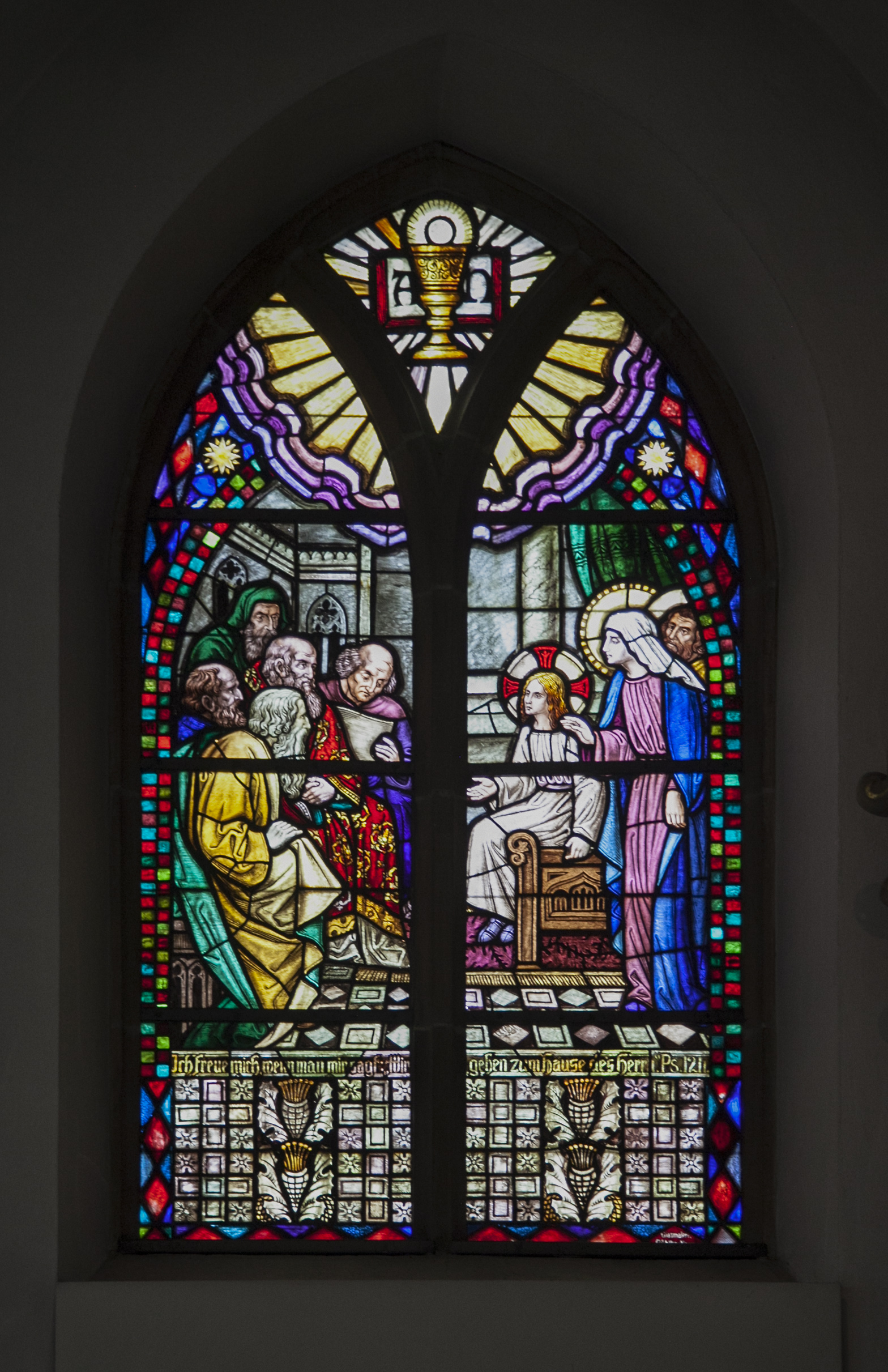 Elte, St. Ludgerus, Chorfenster 1